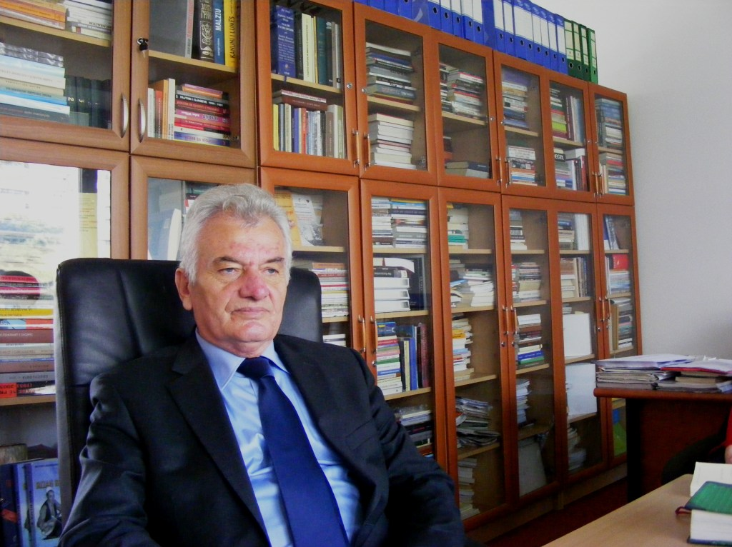 Zymer U. Neziri (1946) mbledhës e studiues i letërsisë popullore dhe pro­fe­­­sor universitar në Universitetin e Prishtinës, Prishtinë , Kosovë